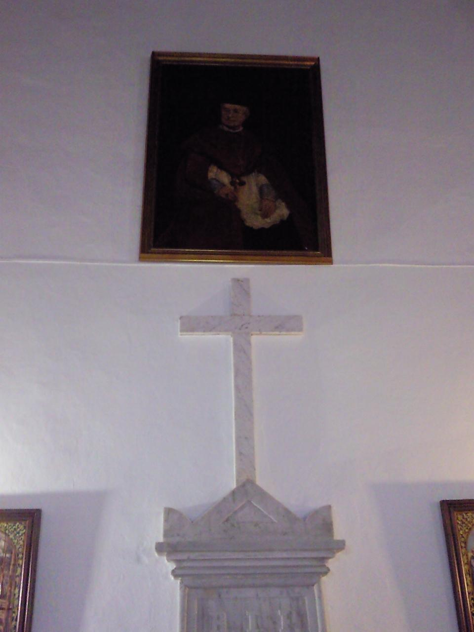 Vista de la tumba y el cuadro del Obispo Idelfonso Infante Macias en la Ermita de Montamayor.